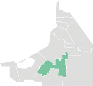 Mapa del municipio de Escárcega en el estado mexicano de Campeche